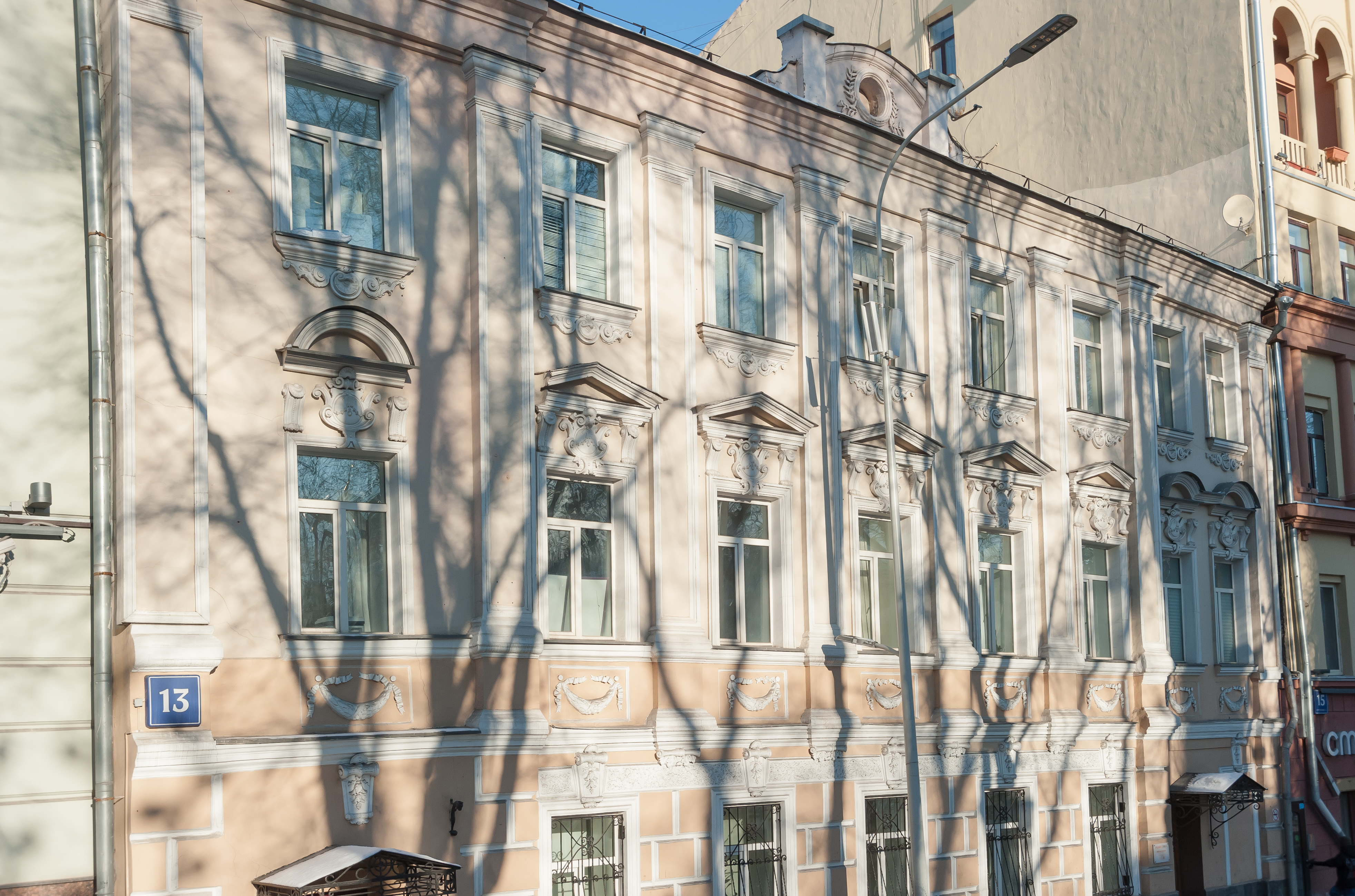 Москва. Петровский бульвар, дом 13